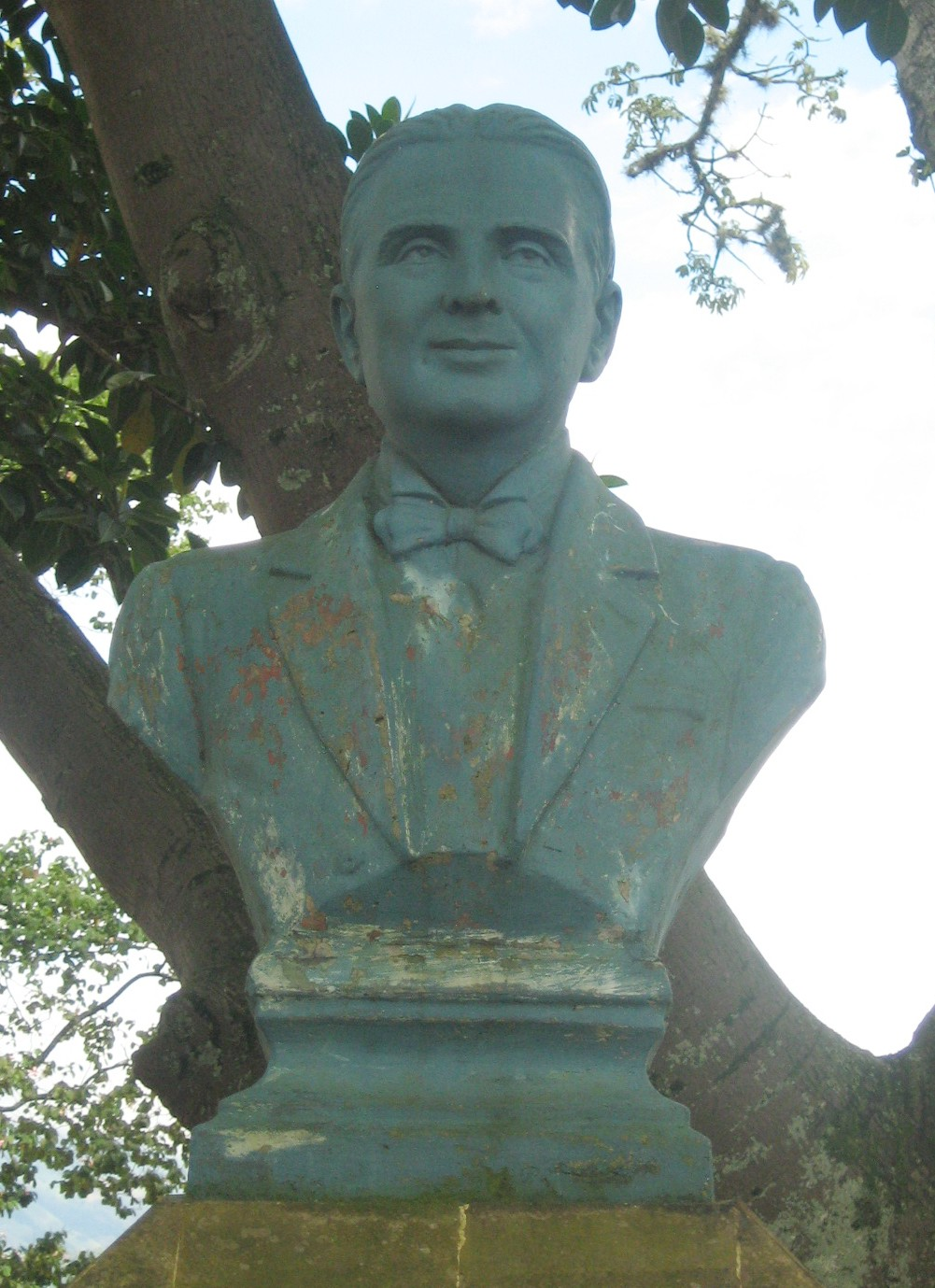 Busto de Mariano Ospina Pérez, ubicado en el parque principal del Municipio de La Estrella, Colombia